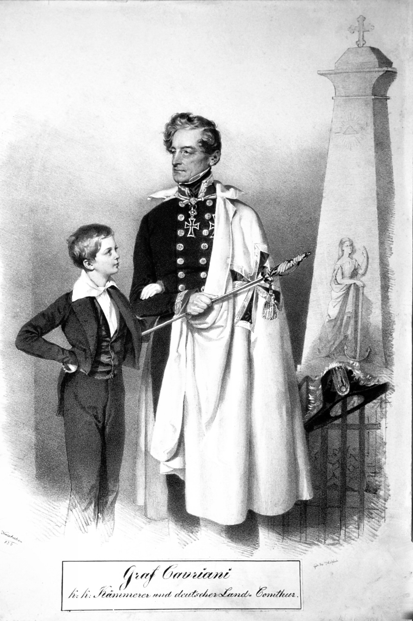 Christoph Graf Cavriani (1780-1857) mit seinem Sohn Franz (1825-1866).